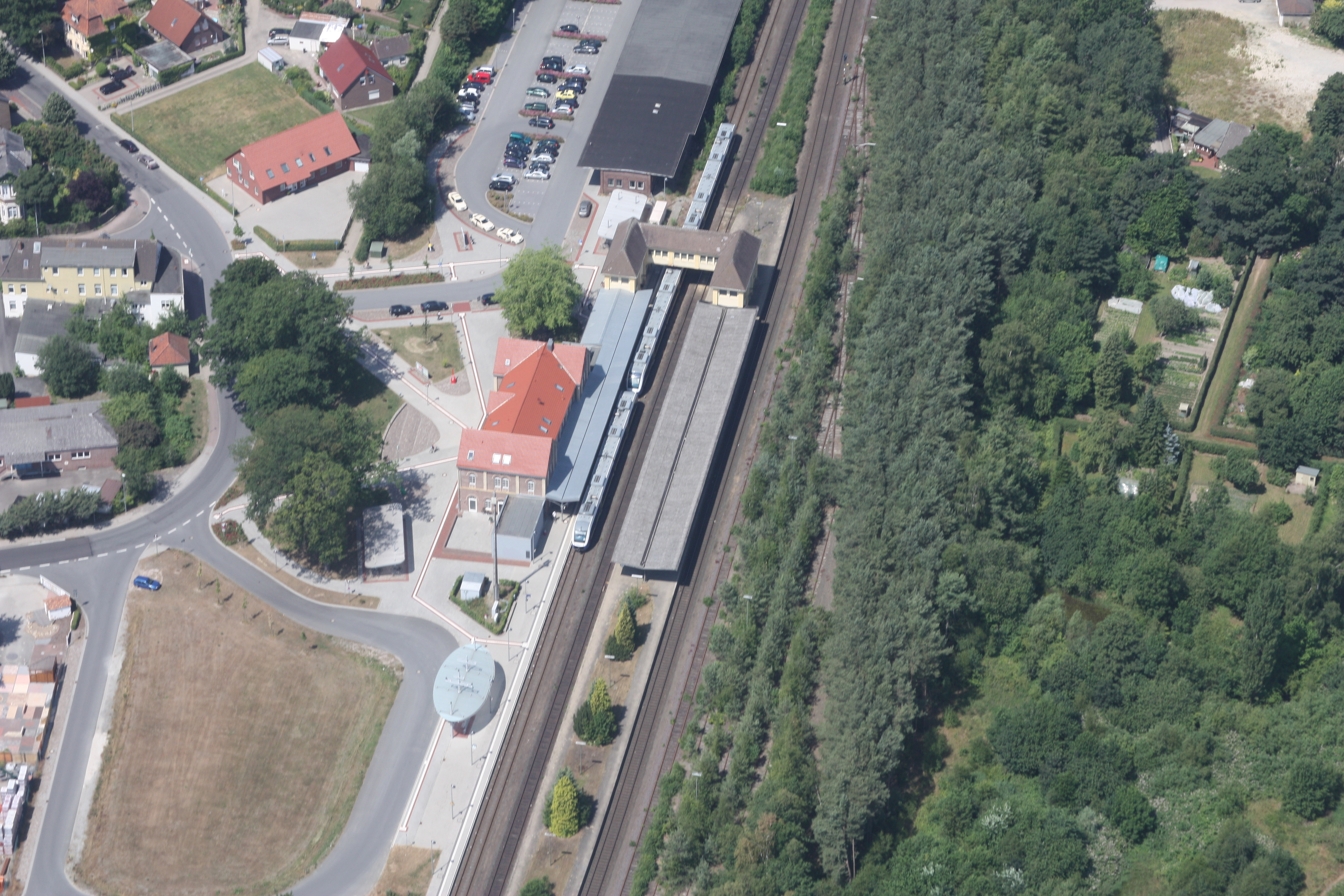 Flug über Varel; von Dangst kommend nach Oldenburg; Flughöhe 500 m = 1500 ft; Juli 2010